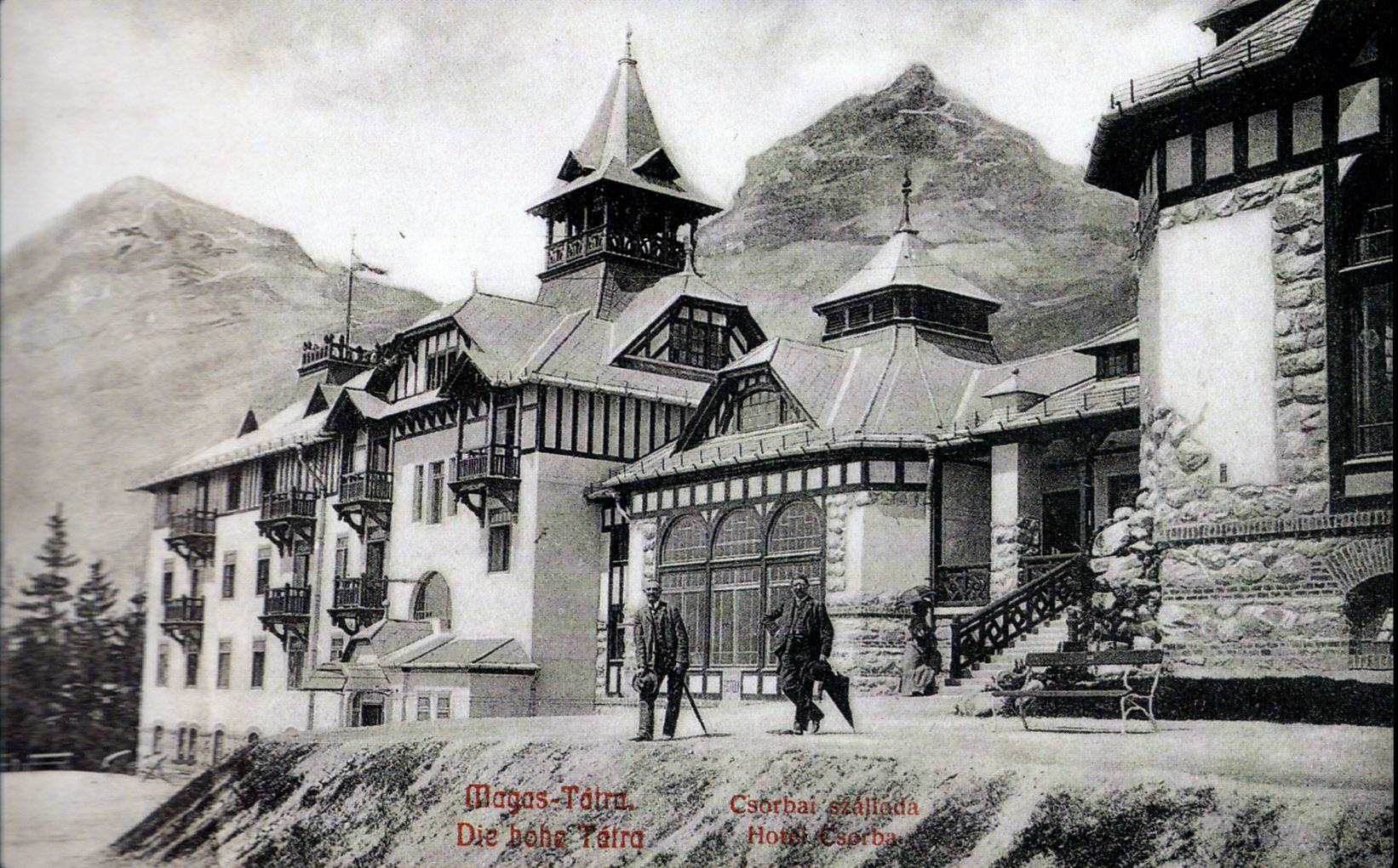 Grandhotel na Štrbskom Plese mal 54 izieb, vybavené boli ústredným kúrením. V hoteli bol vodoliečebný ústav.